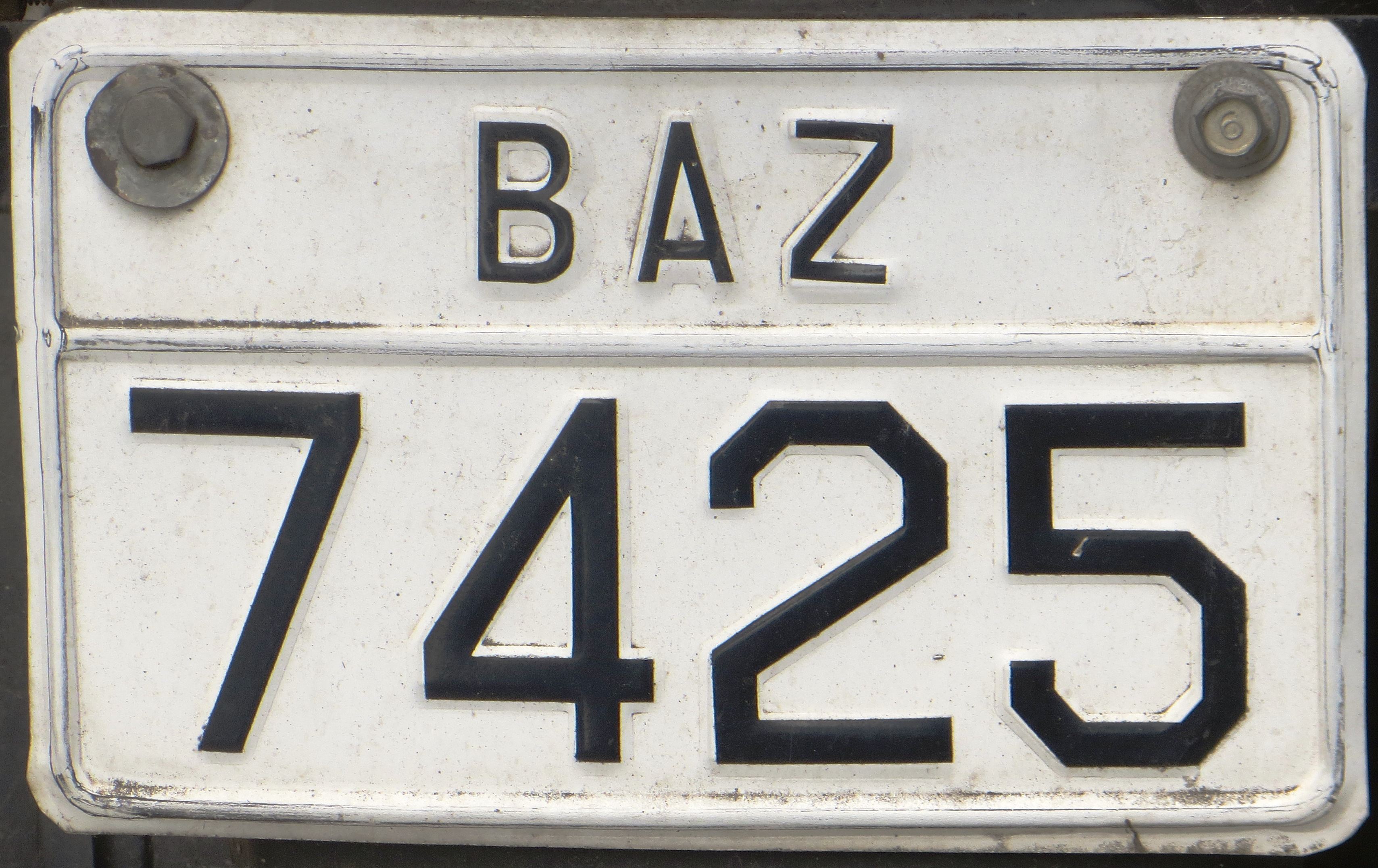 Griekse brommer kenteken plaat